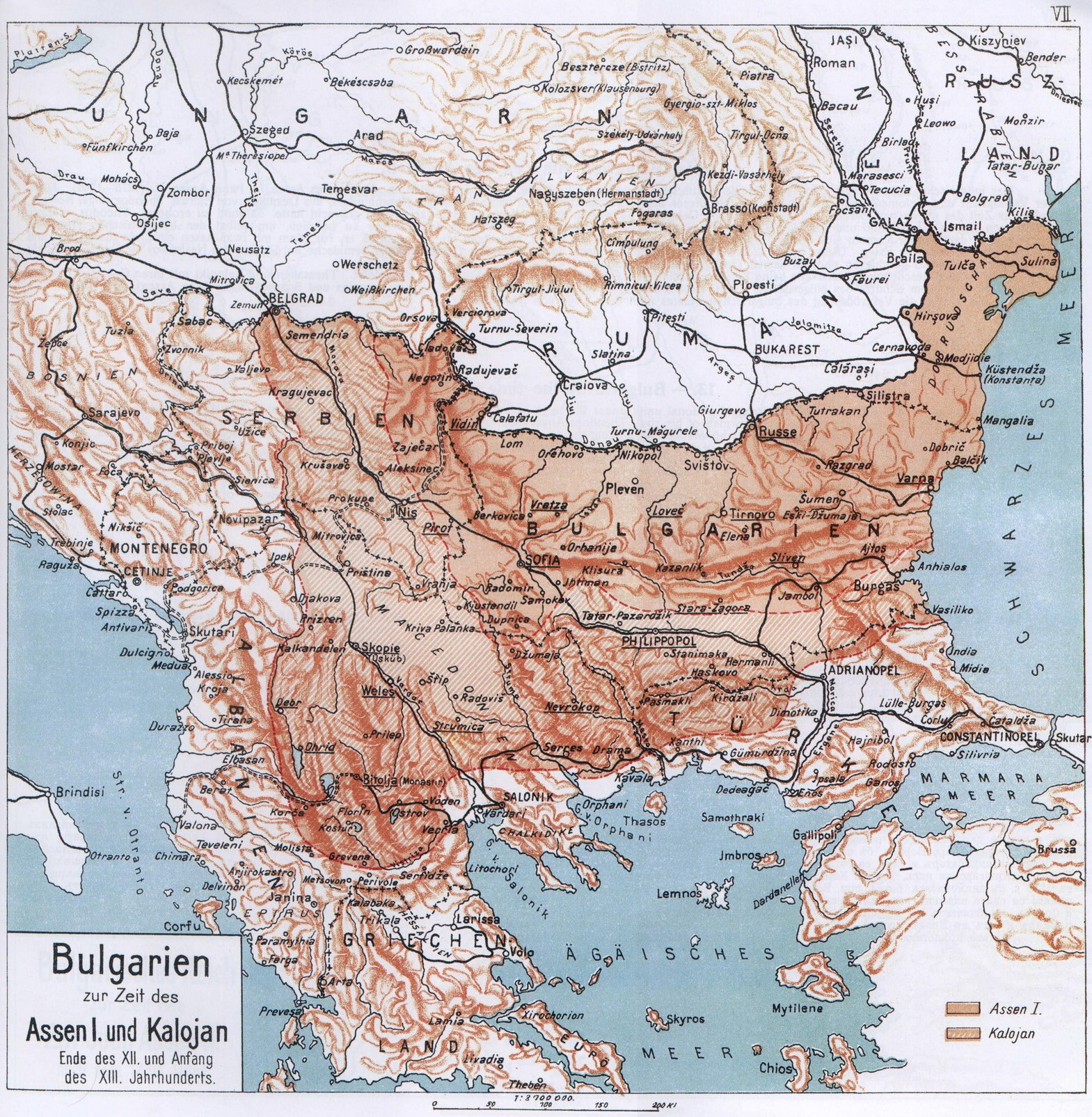 Карта на България по времето на цар Калоян